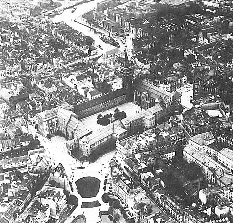 Luftaufnahme des Königberger Schlosses